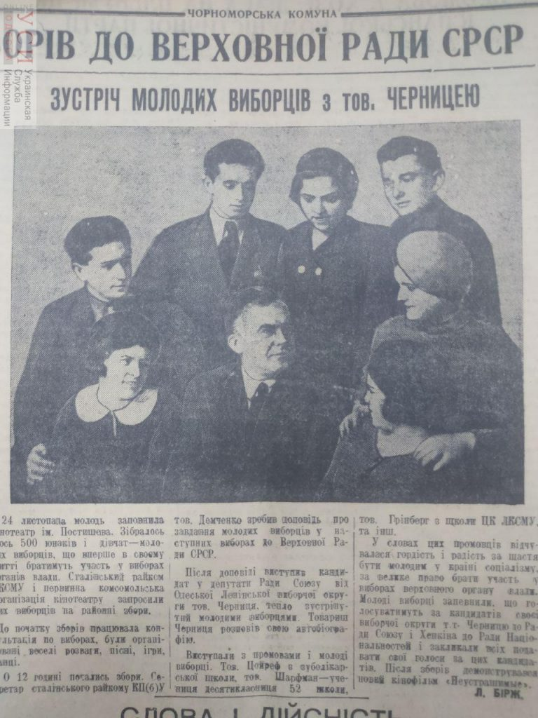 Аҧсшәа: russia